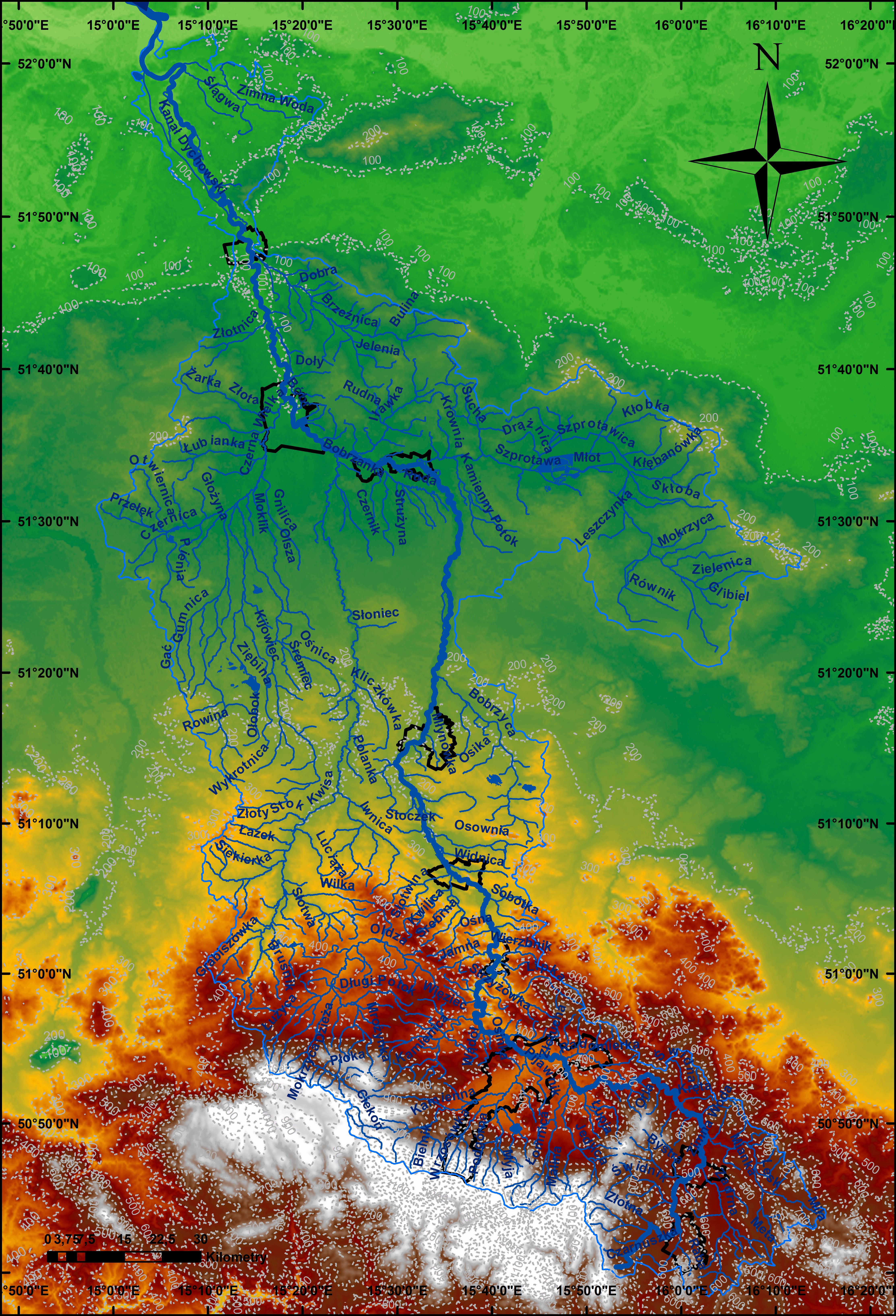 Dorzecze Bobru; rzeka Bóbr = pogrubiona niebieska linia, jej dopływy = cienkie niebieskie linie, Odra – fragment (recypient) = bardzo gruba niebieska linia z grotem wskazującym kierunek prądu, granica zlewni Bobru = jasnoniebieska linia, miasta (w granicach administracyjnych) przez które przepływa Bóbr (od źródła: Lubawka, Kamienna Góra, Jelenia Góra, Wleń, Lwówek Śląski, Bolesławiec, Szprotawa, Małomice, Żagań, Nowogród Bobrzański) = czarne obrysy, izohipsy = szare obrysy przerywane